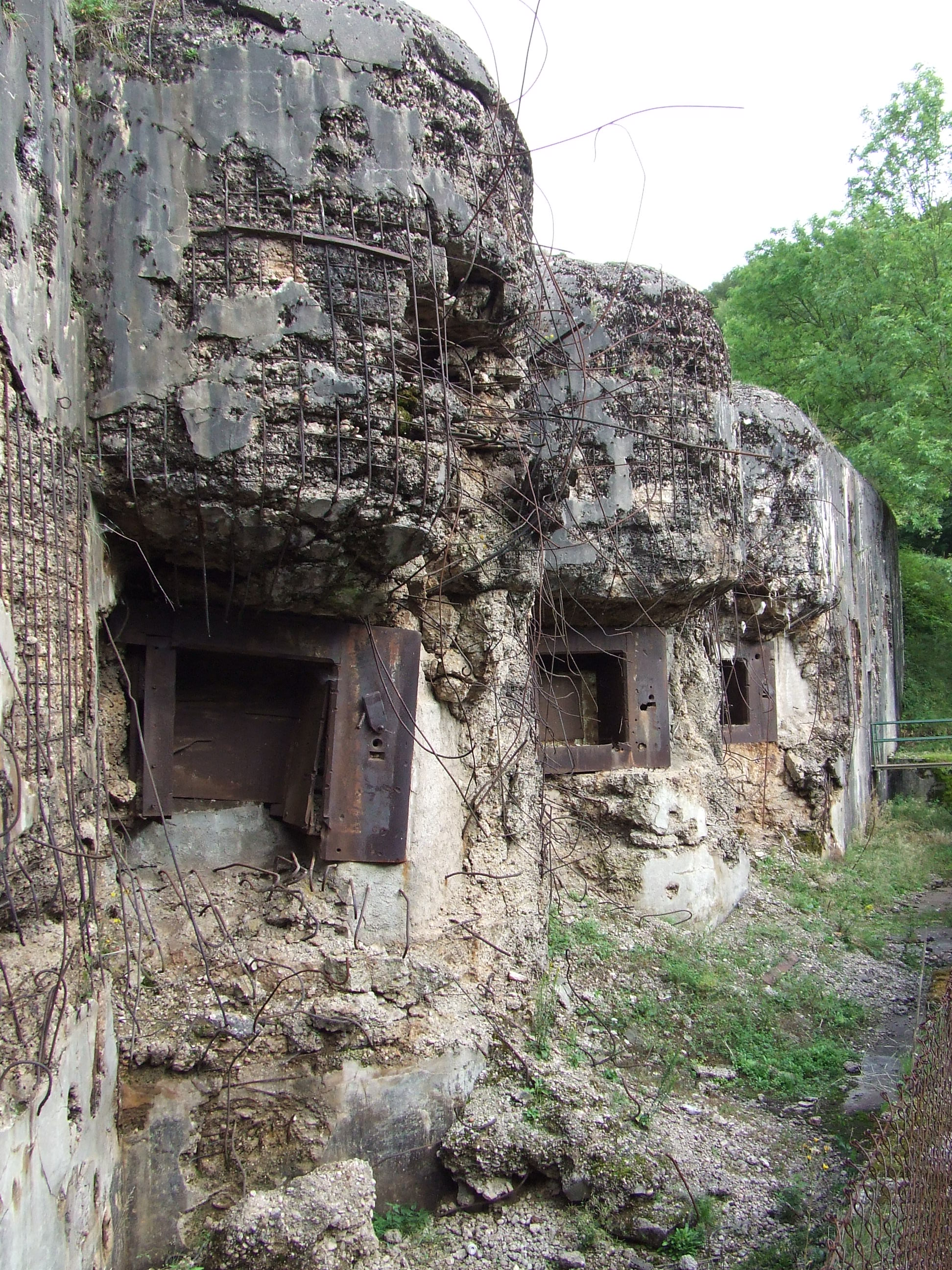 Bloc de défense du Hackenberg. C'est par ce bloc que les Américains ont repris le fort, d'où les importants dégats.